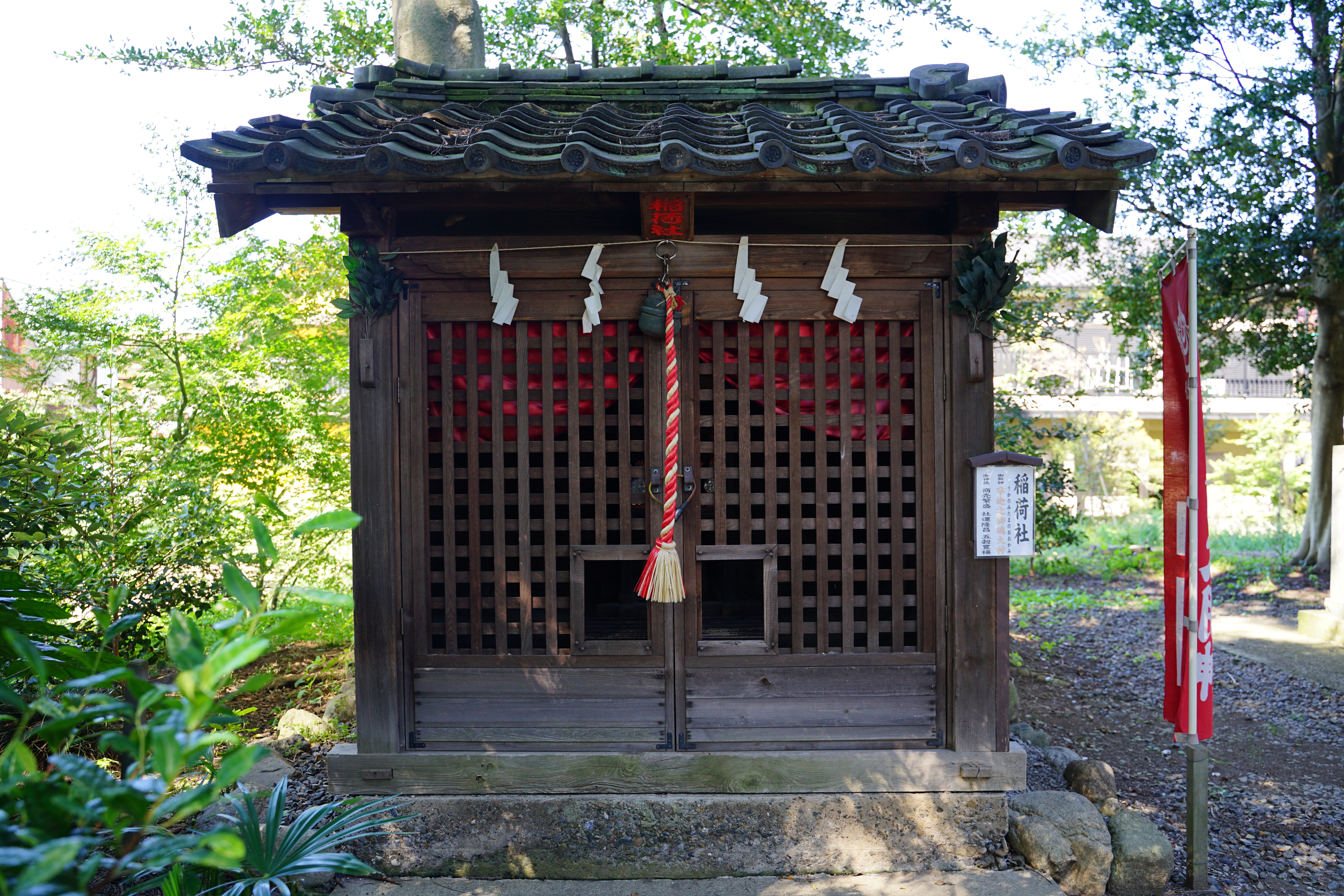 姫宮神社（埼玉県南埼玉群宮代町）境内社の稲荷社